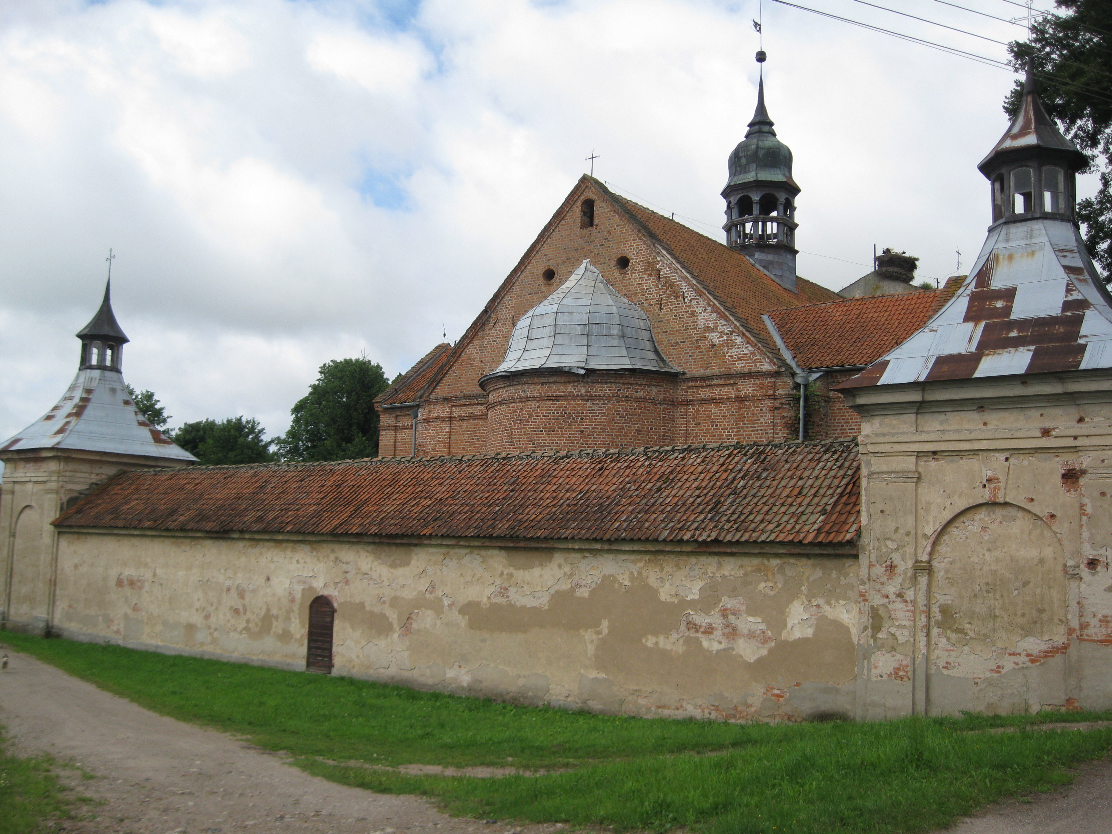 Chwalęcin - kościół parafialny pw. św. Krzyża wraz z wyposażeniem wnętrza, dziedzińcem, krużgankami oraz cmentarz (zabytek nr A-203)